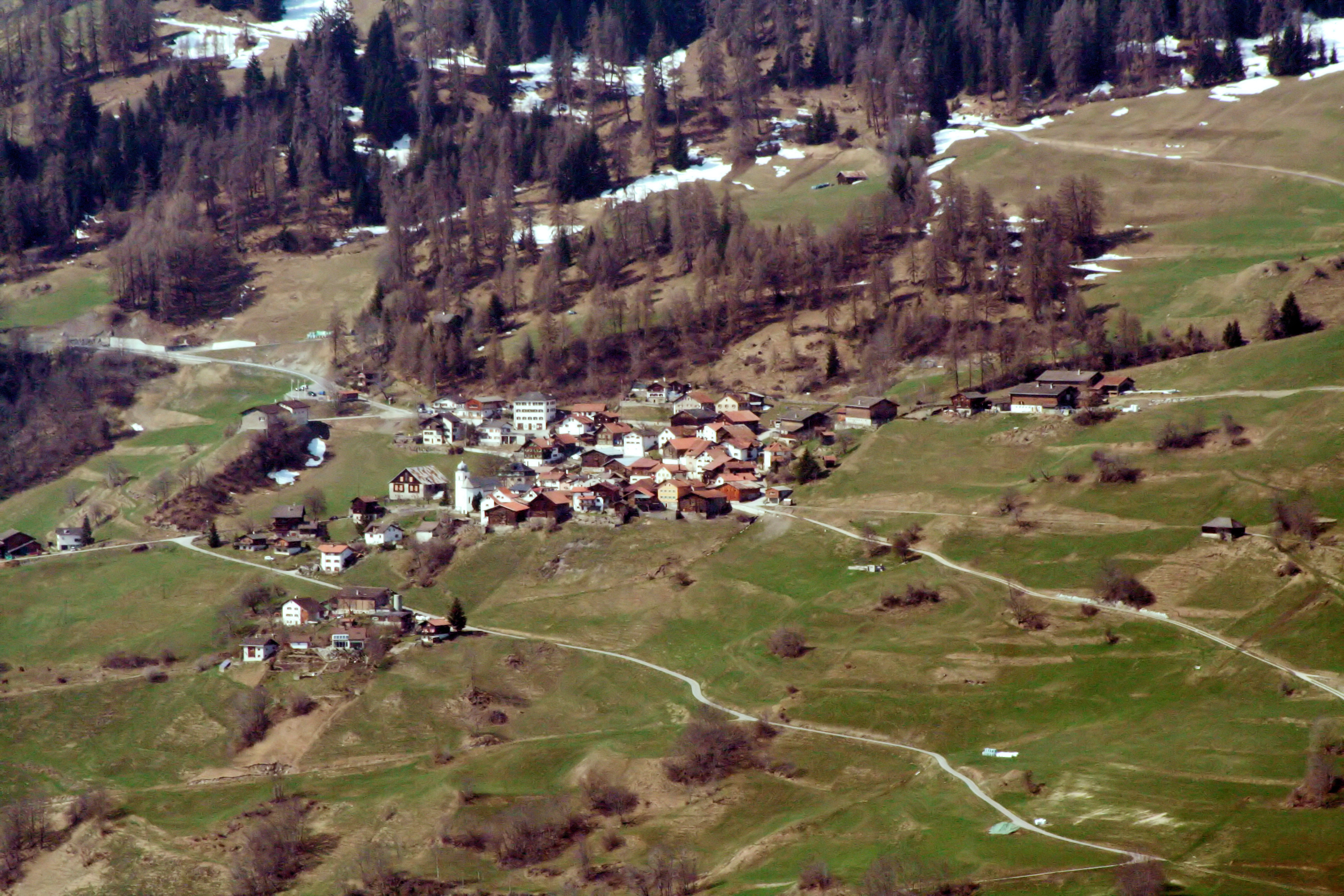 Präz